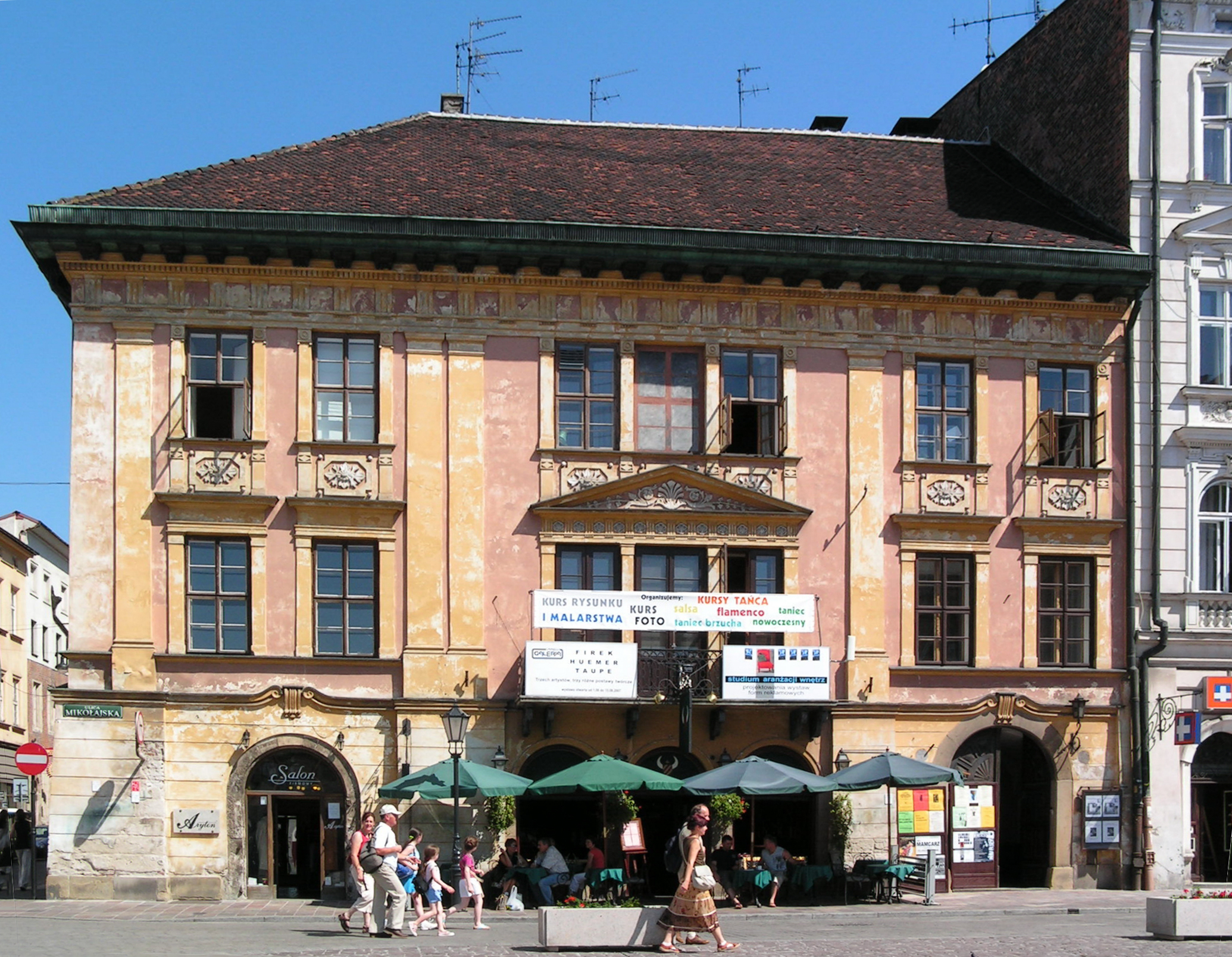 Kamienica Lamellich, Kraków